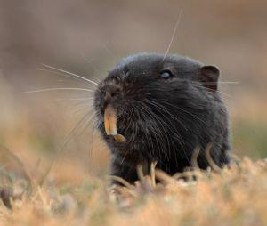 Cururo / Coruro / Kururo - (Spalacopus cyanus)